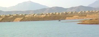 Daribagh - Lorestan - Iran, Nasser Sadeghi